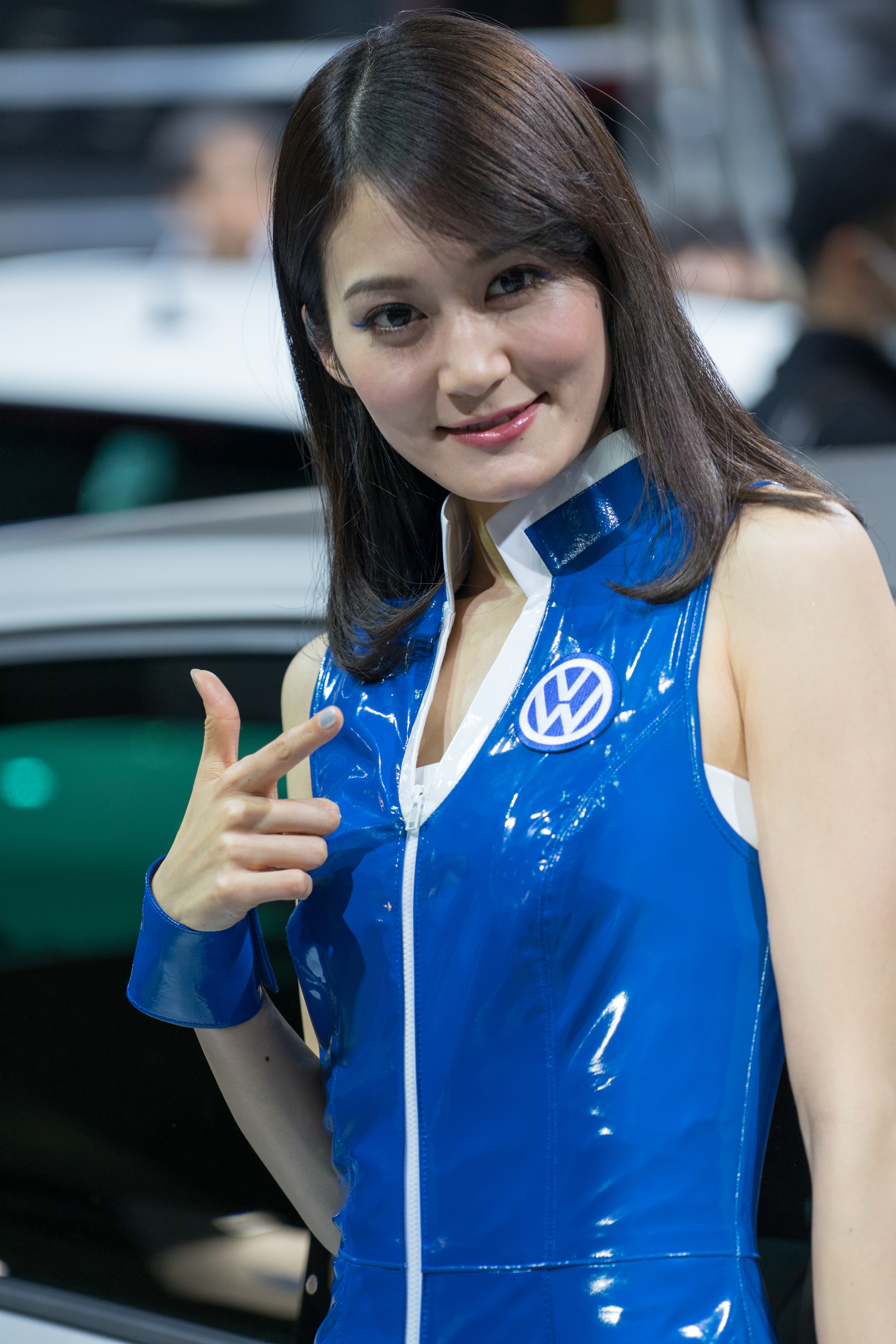 TOKYO AUTO SALON 2017 （東京オートサロン2017）-147.jpg